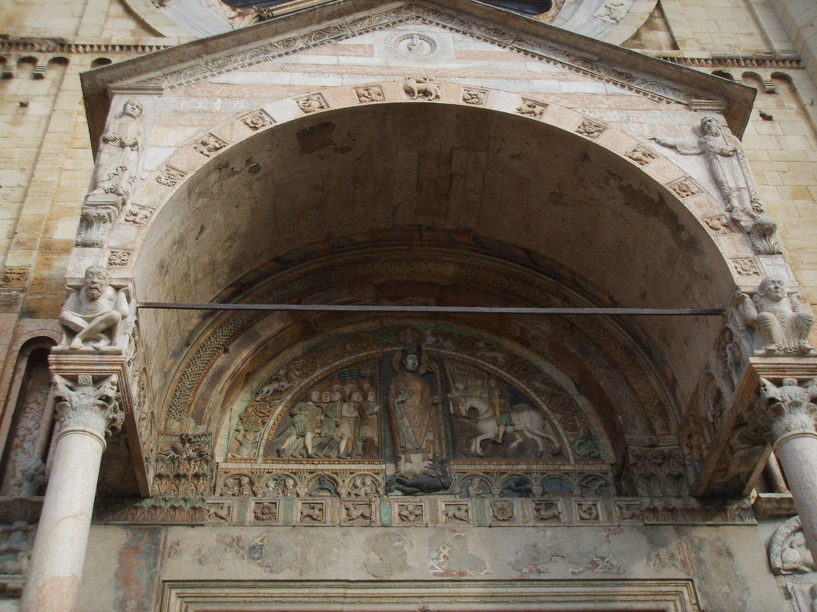 Basilica di san zeno protiro, lunetta di nicholaus